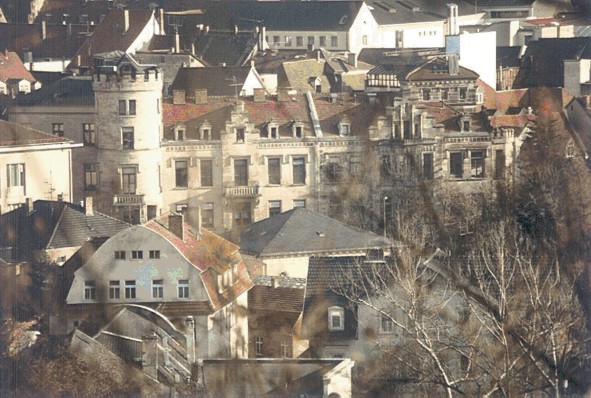 Coburg Altstadt Fotograf: presse03, selbst erstellt, Dez. 2003 Lizenz: GNU-FDL